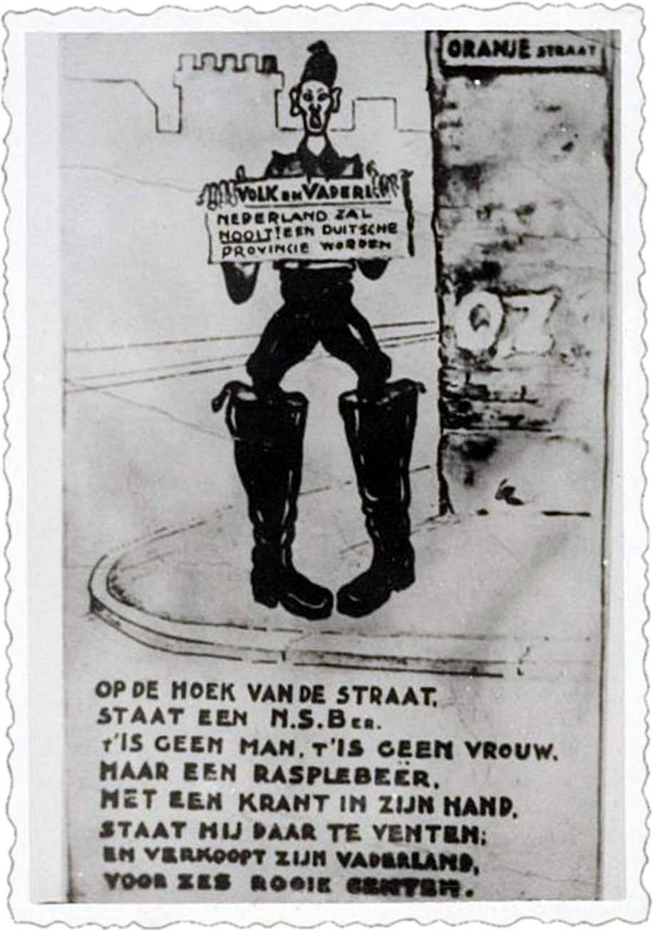 Anti-N.S.B. spotprent. Het rijmpje zegt: Op de hoek van de straat,staat een NSB'er.'t is geen man, 't is geen vrouw,Maar een rasplebeër.Met een krant in zijn hand,Staat hij daar te venten;Hij verkoopt zijn Vaderland,Voor zes rooie centen.